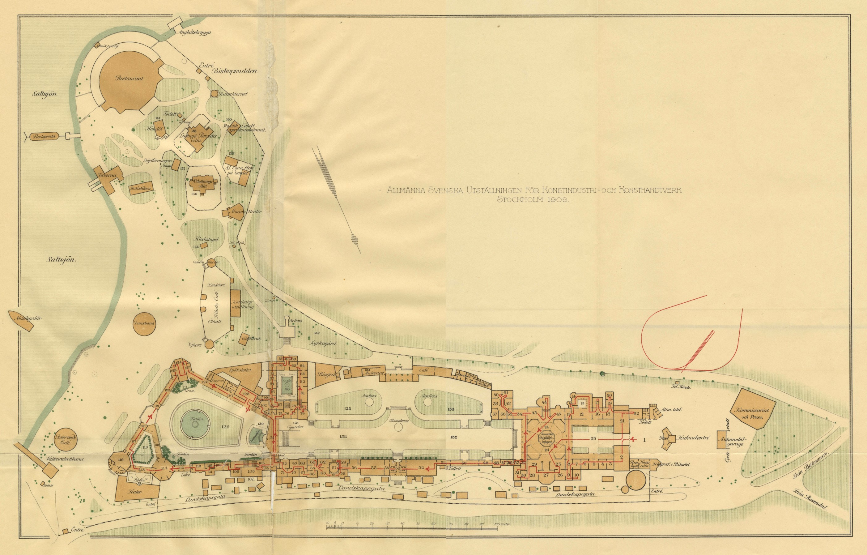 Översiktskarta över utställningsområdet för Konstindustriutställningen 1909